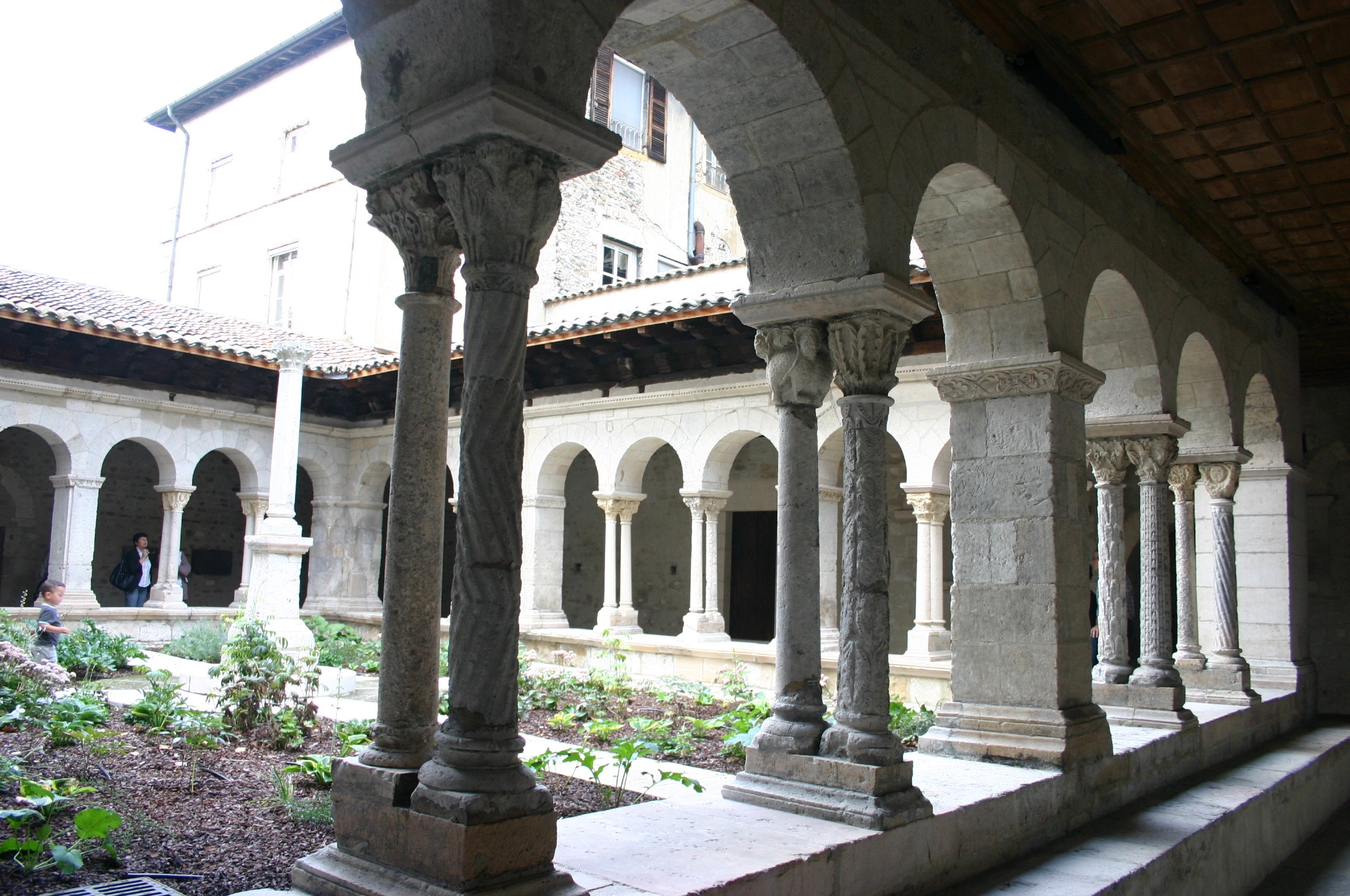 Église Saint-PierreMusée archéologique Saint-Pierre de Vienne (Classé) .